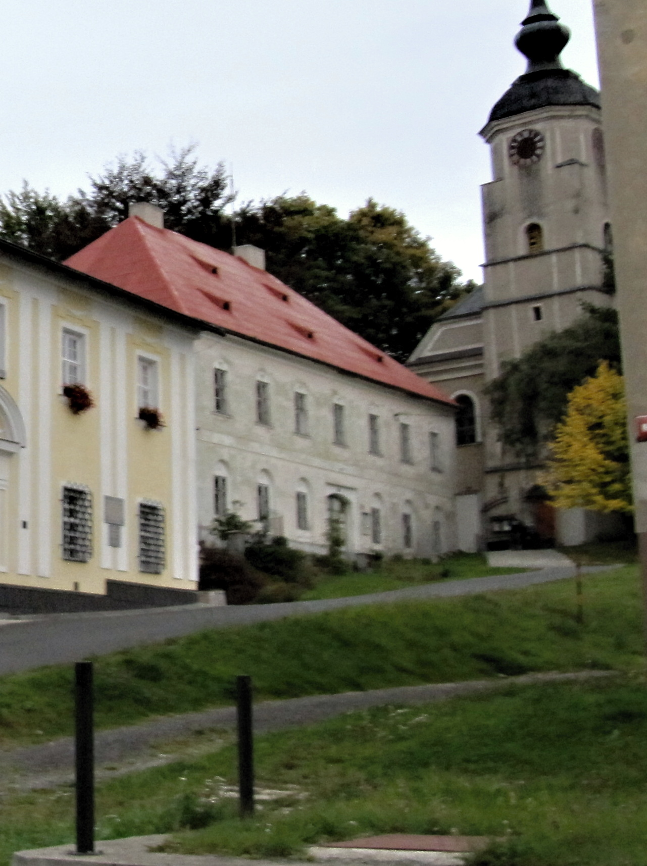 Fara (Ryžoviště), Mučedníků 51, Ryžoviště